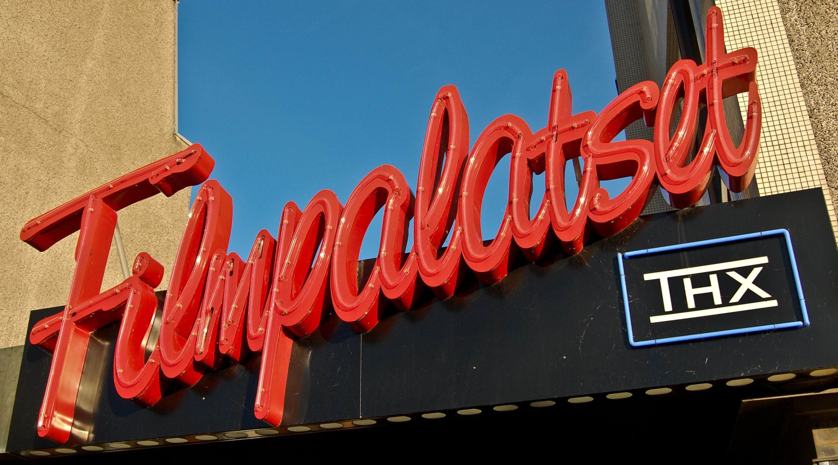 Skylten ovanför entén till Filmpalatset i Bromölla.